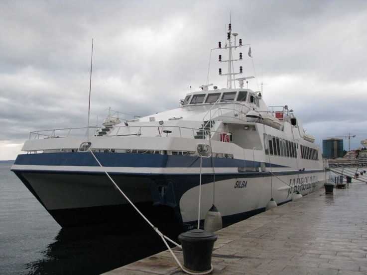 Katamaran Silba u Splitu IMO number: 8843927 Callsign: 9A6281